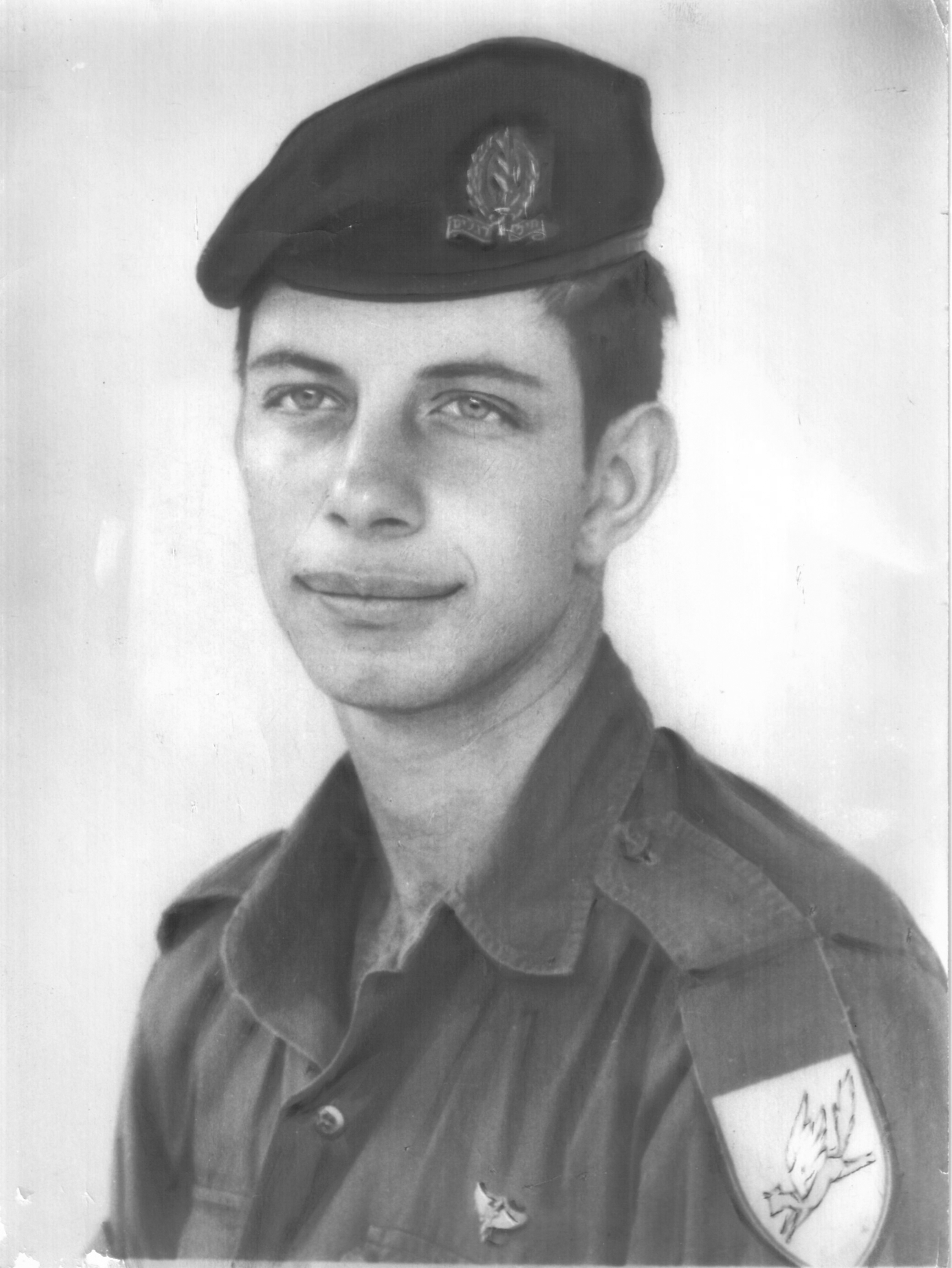 אבשלום שוהם